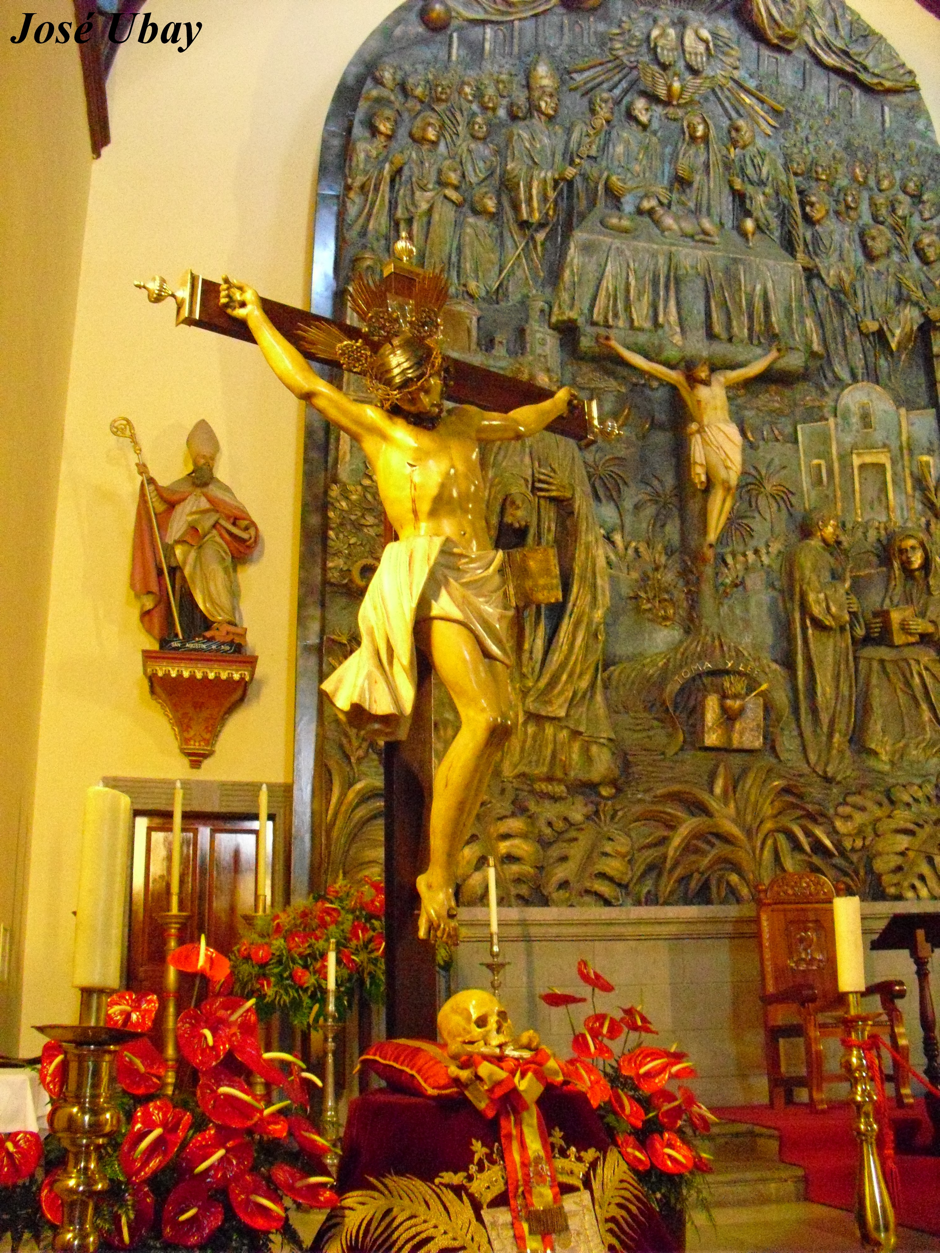 Festividad del Santísimo Cristo de la Vera Cruz en septiembre de 2011.